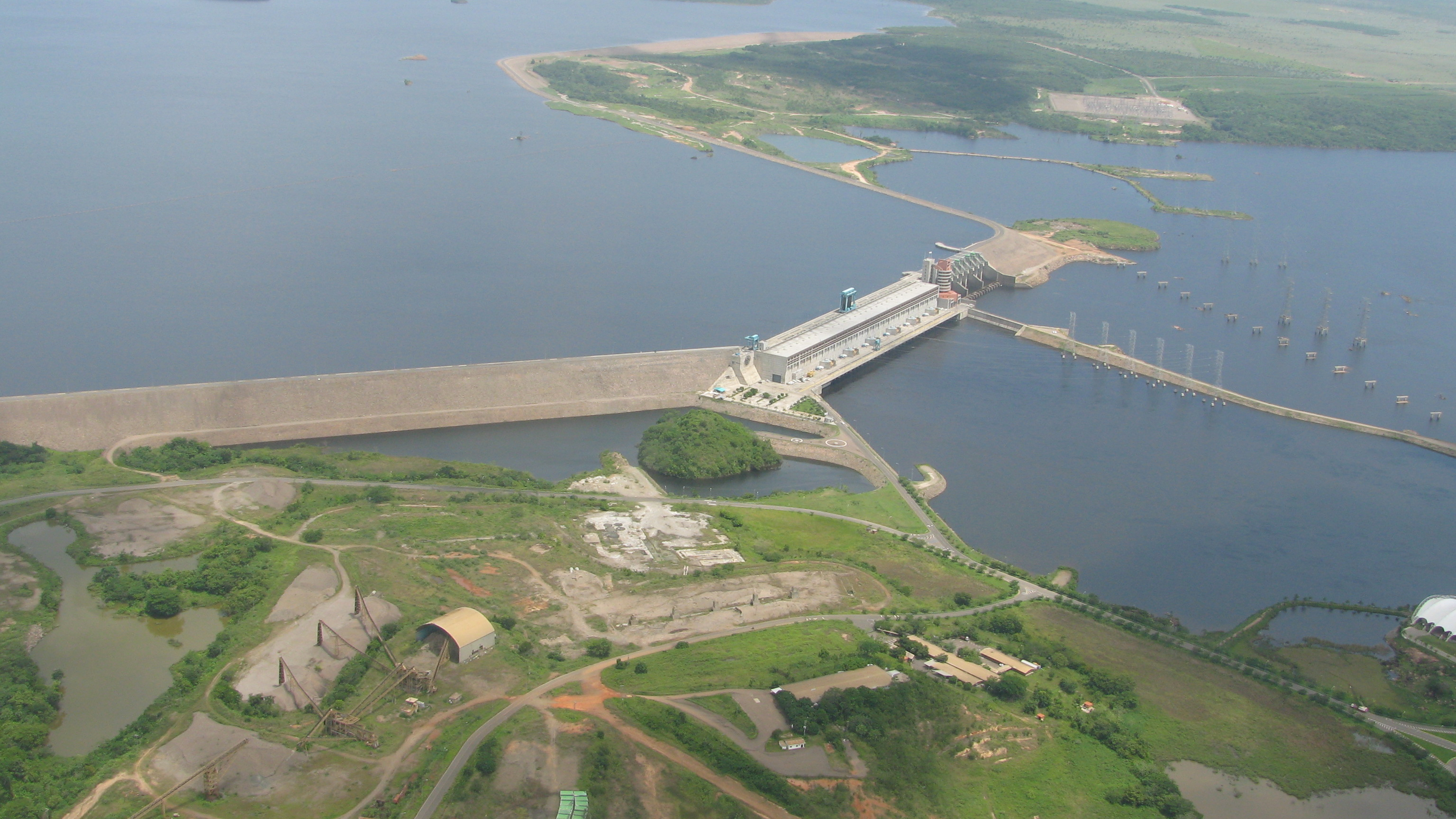 Represa Caruachi - vista aérea